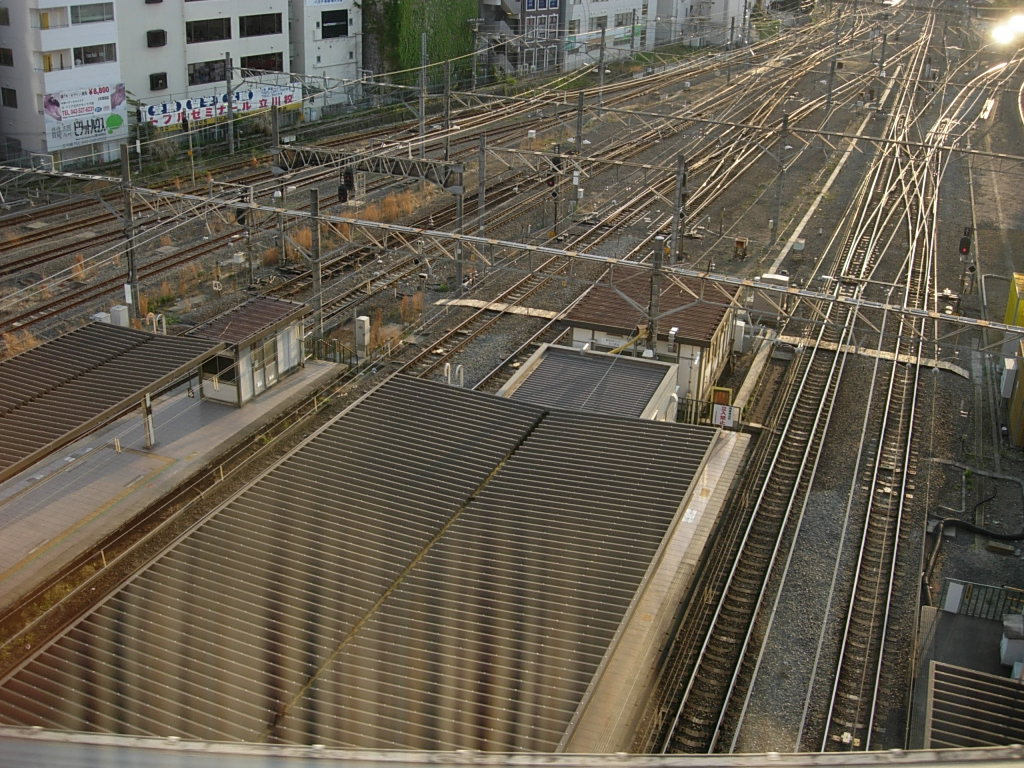 다치카와기타 역과 다치카와미나미 역 구간에서 촬영한 다치카와 역